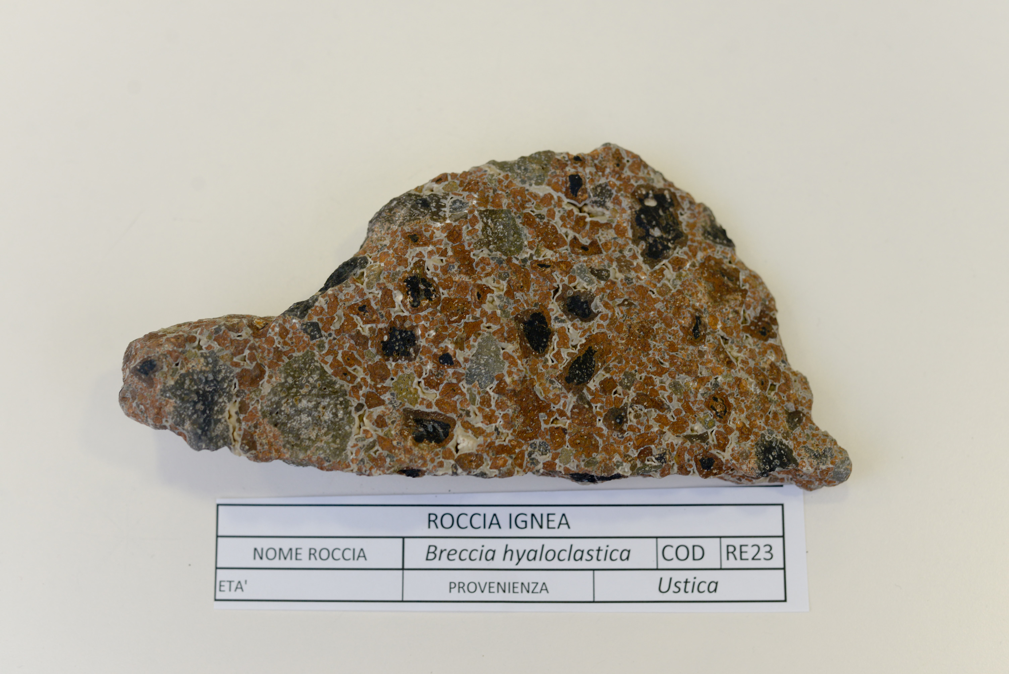 Roccia ignea: breccia hyaloclastica (RE23). Da Ustica.